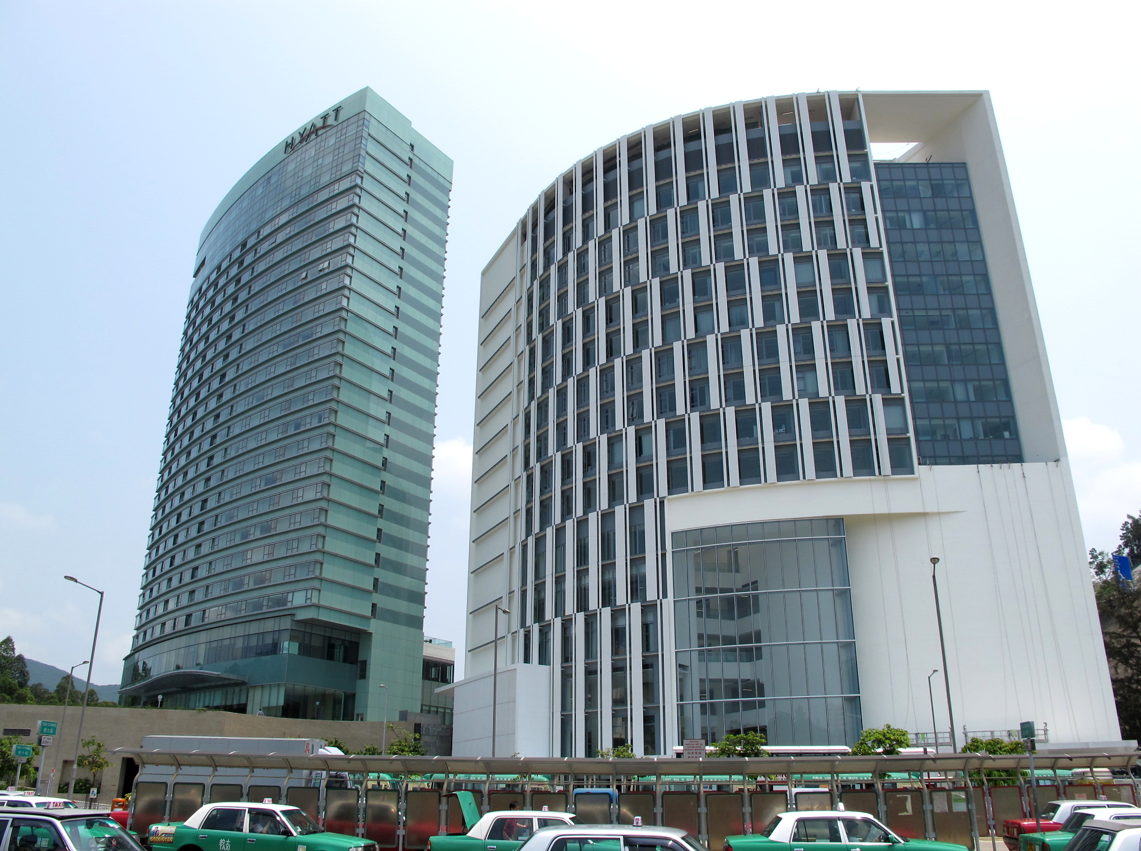 Hyatt Shatin & Cheng Yu Tung Building